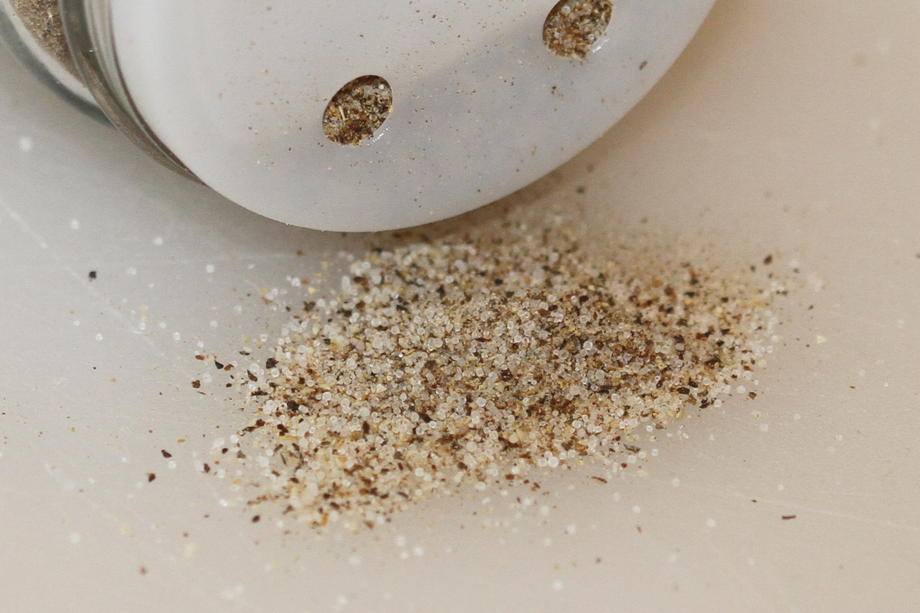 Piffi.